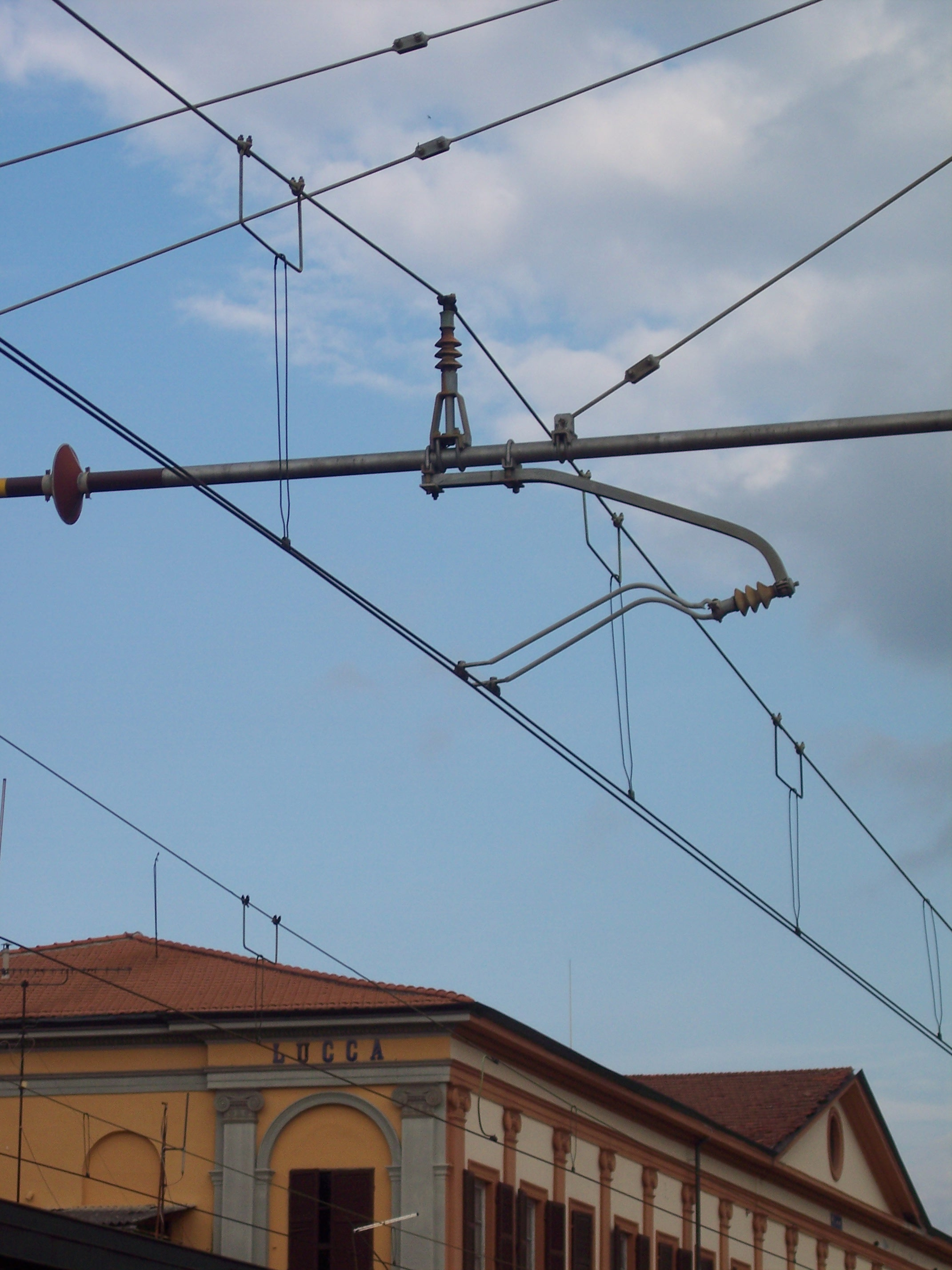 Oberleitung der italienischen Bahn am Bahnhof Lucca.